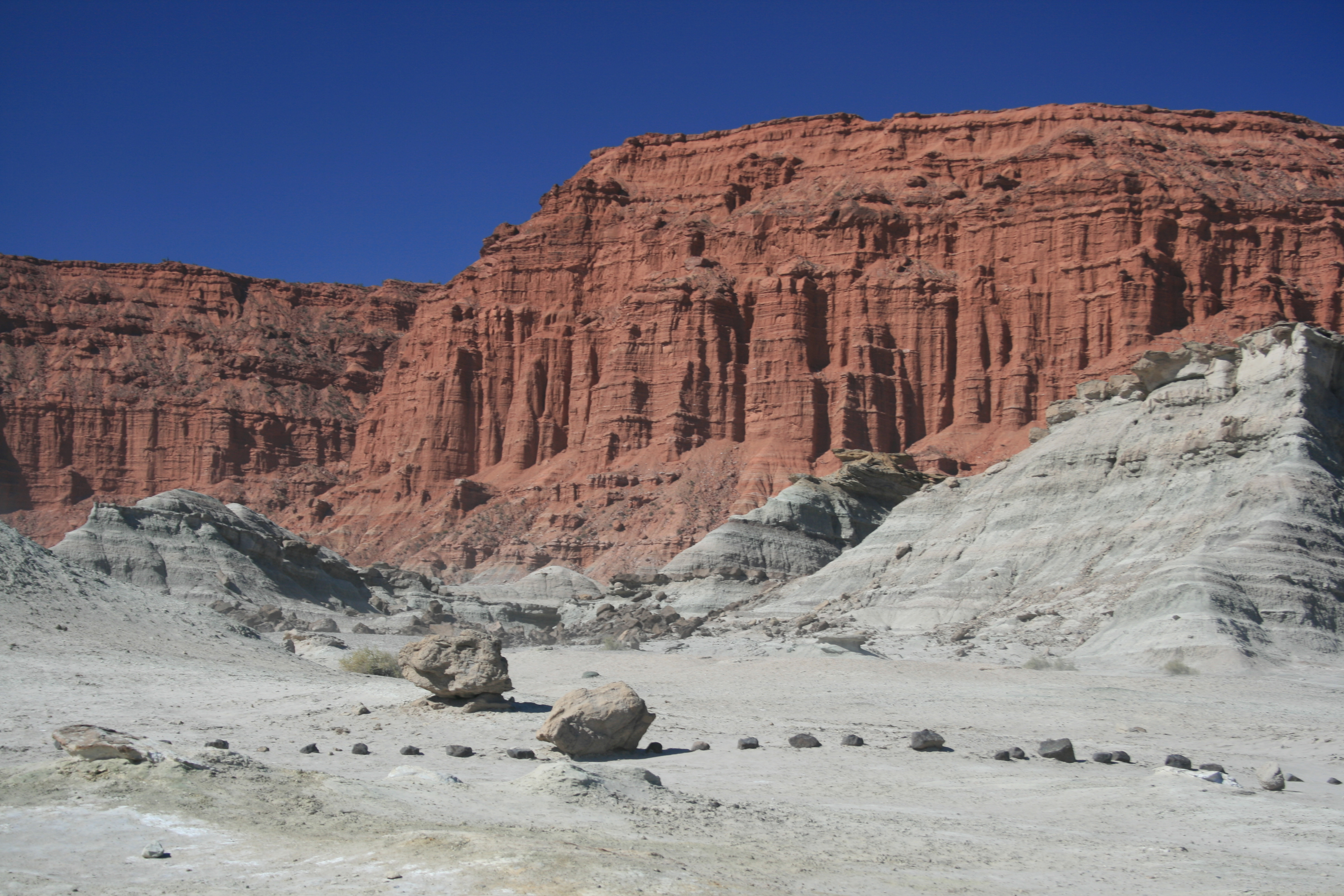 Yacimiento de Ischigualasto